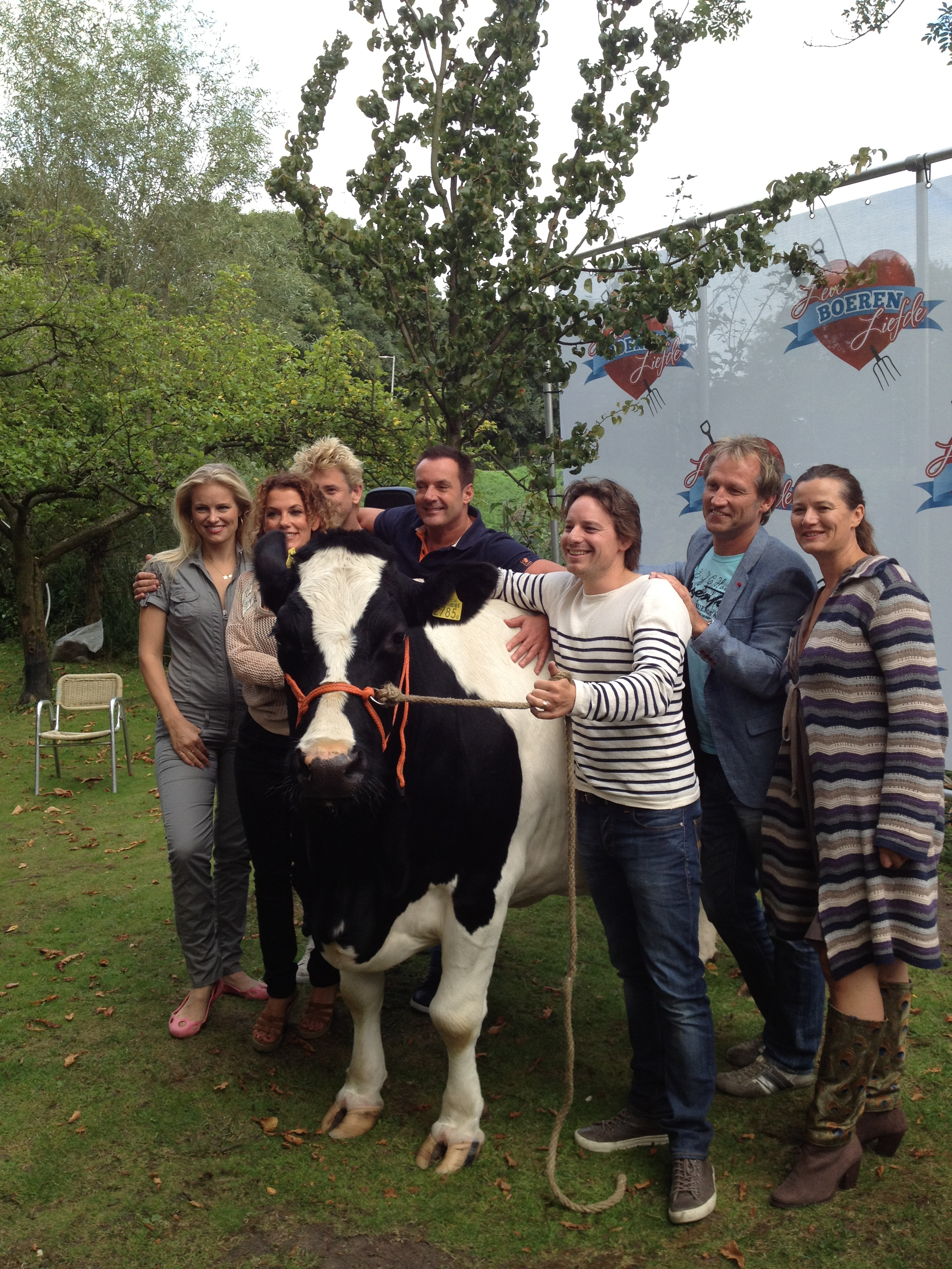 Persmoment van Leve Boerenliefde, van links naar rechts: Marit van Bohemen, Tatum Dagelet, Waldemar Torenstra, koe, Gerard Joling, Cas Jansen, Steven de Jong, Petra Goedings.